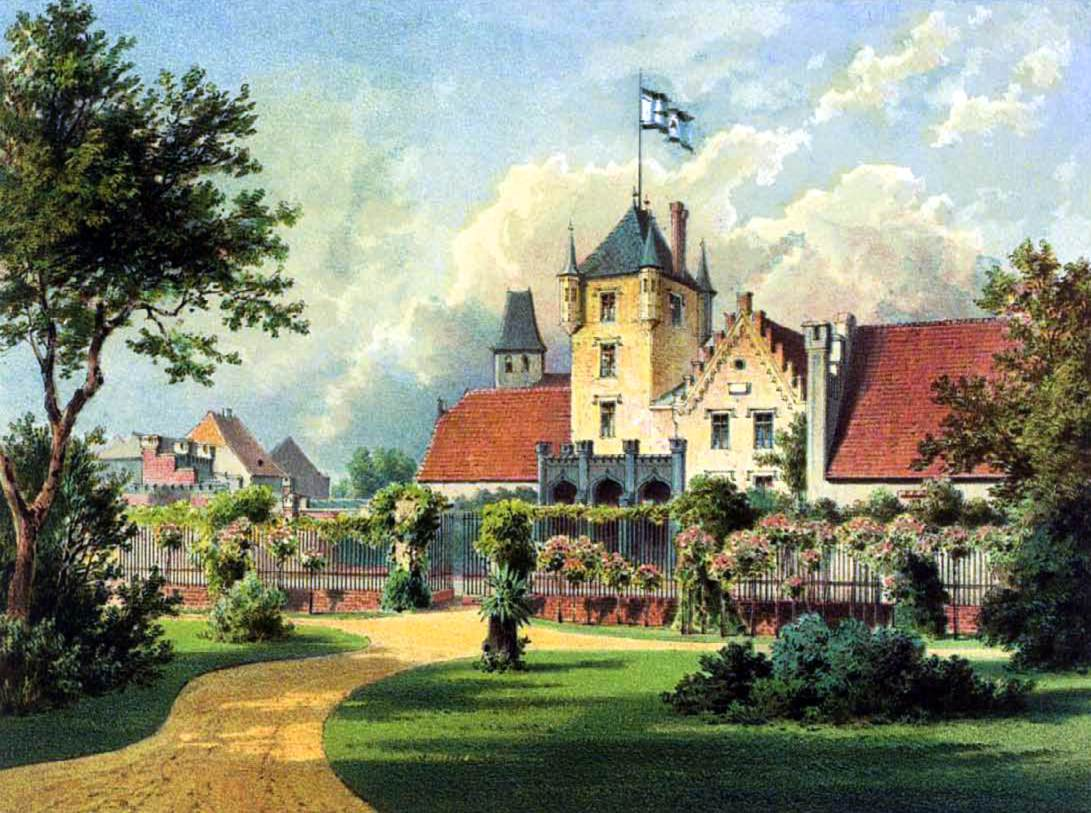 Burg Brumby, um 1865, Kreis Calbe, Provinz Sachsen